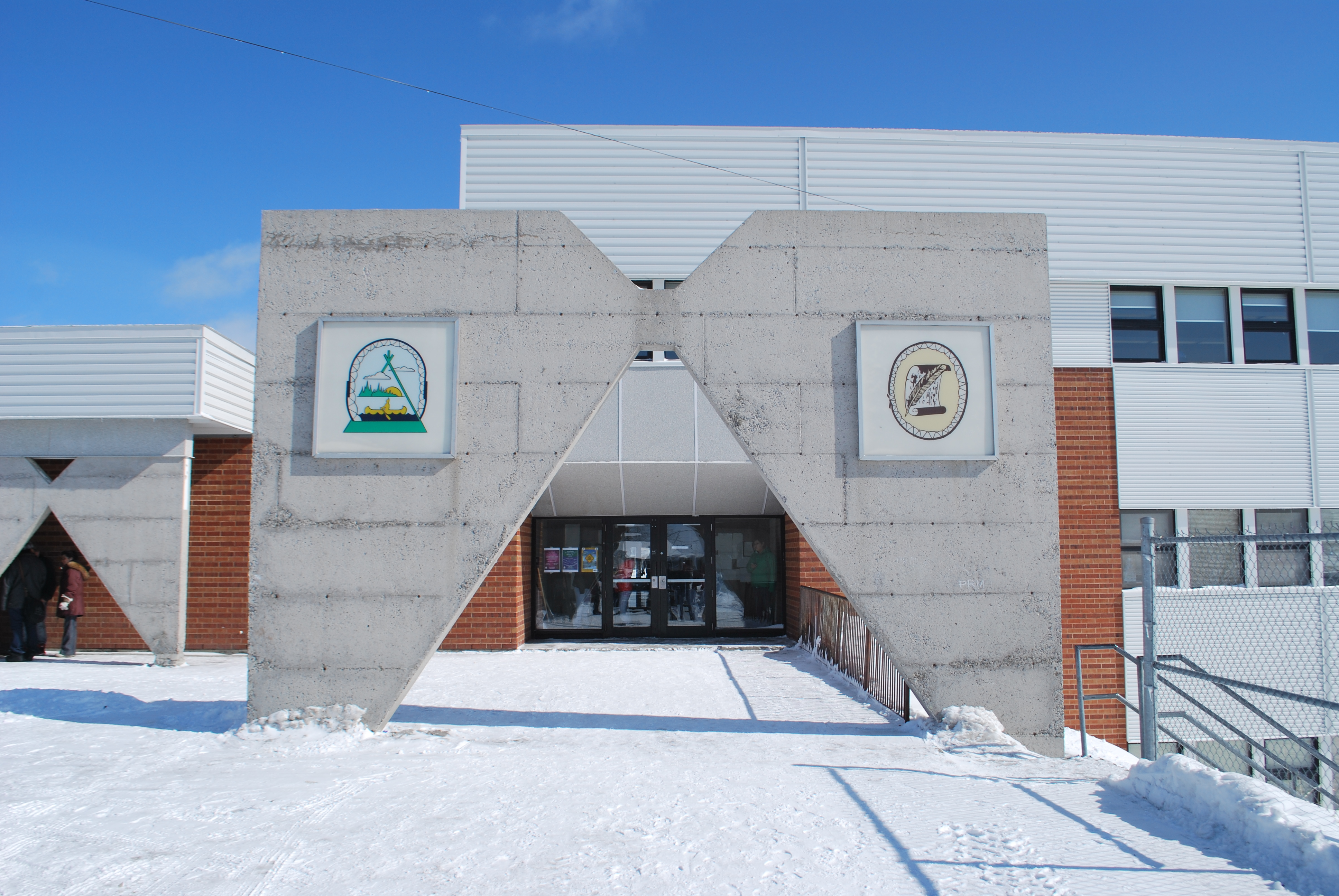 Mistissini. Entrée de l'école secondaire.